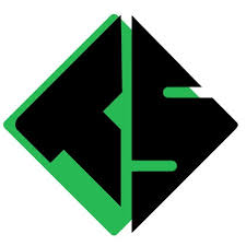 ts enter